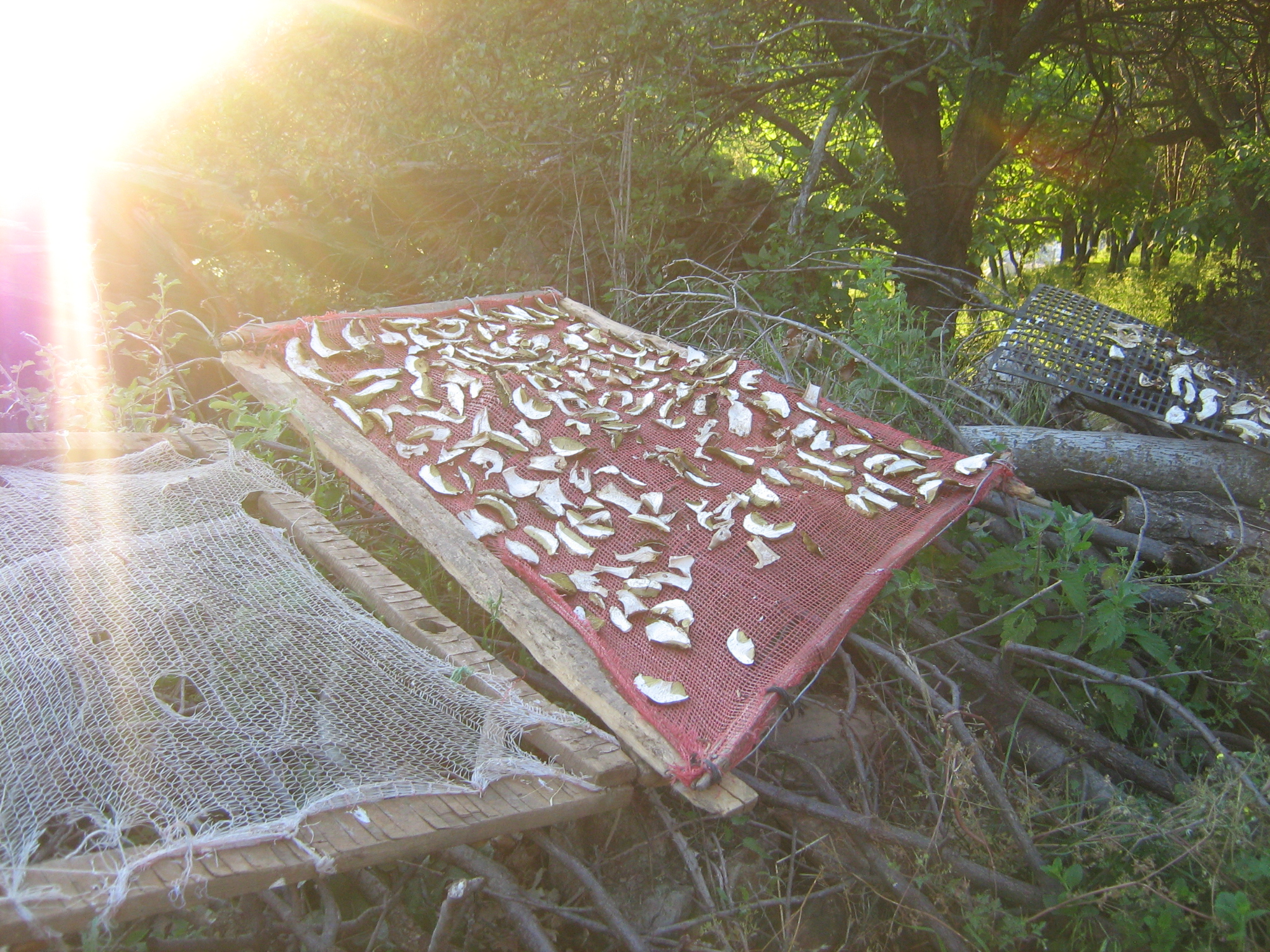 Сушење на печурки на сонце во село Косово, собирањето на шумски плодови е дополнителен извор ако не и главен извор на приходи во селата од Поречието